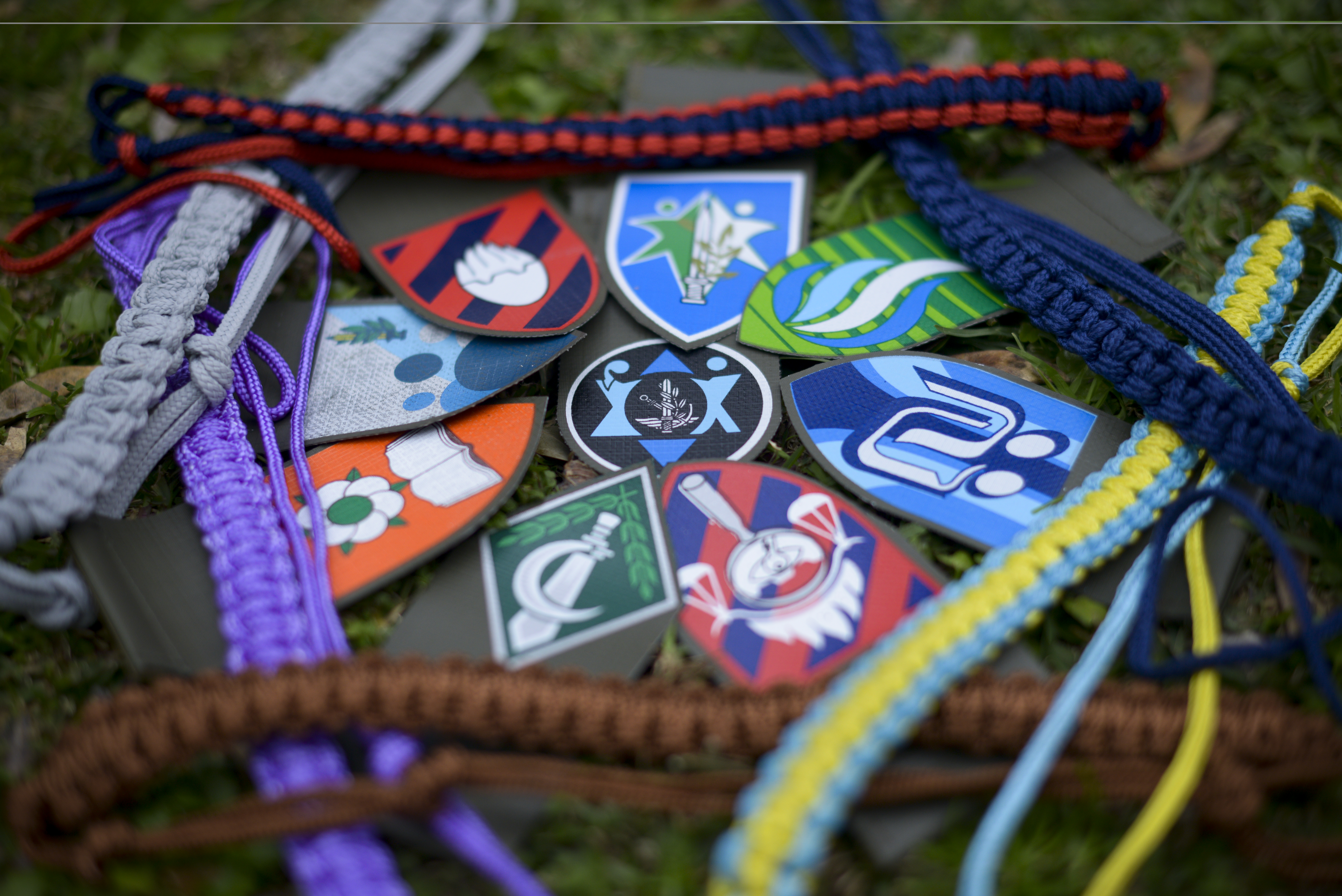 סמלי צה"ל.